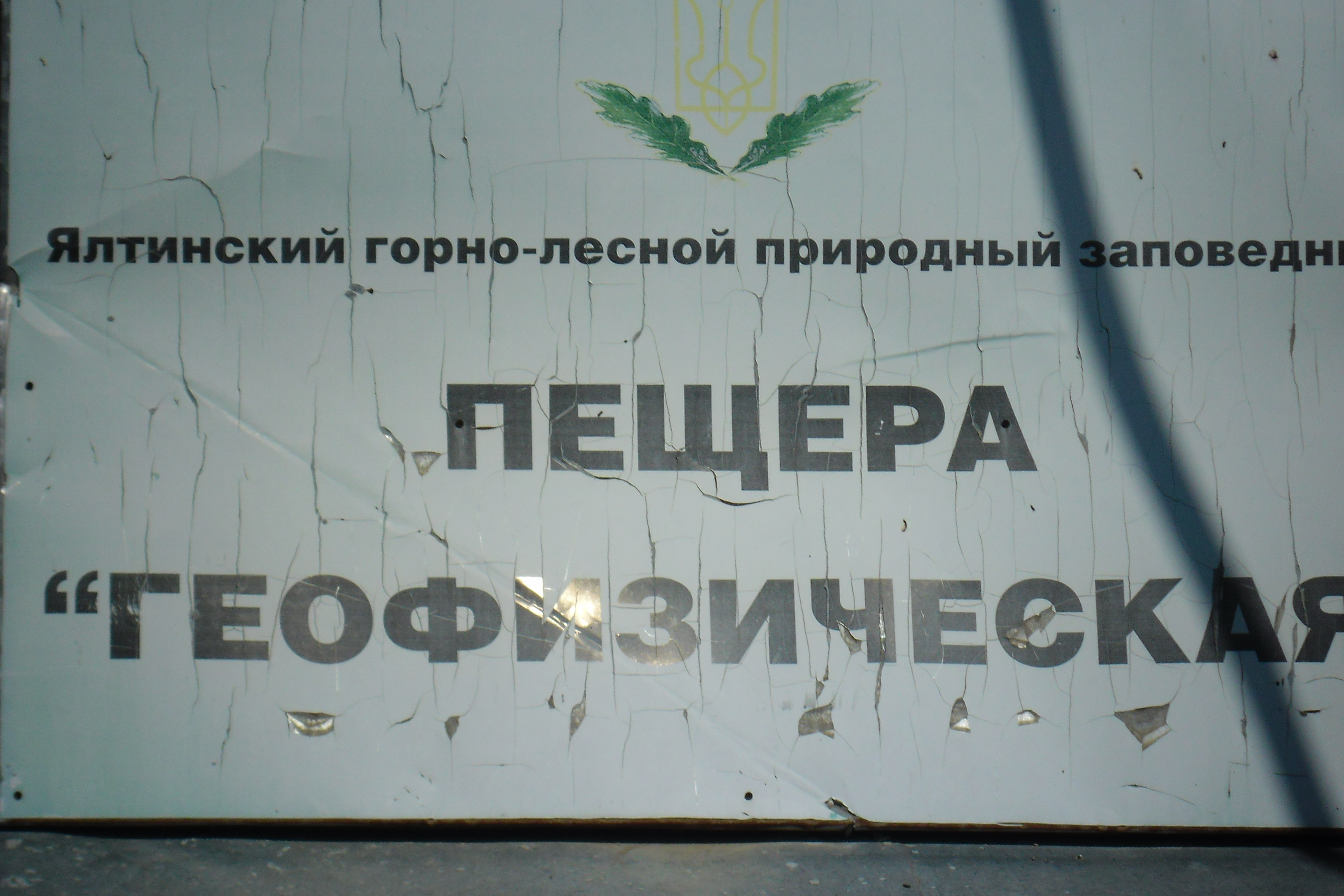 Фото